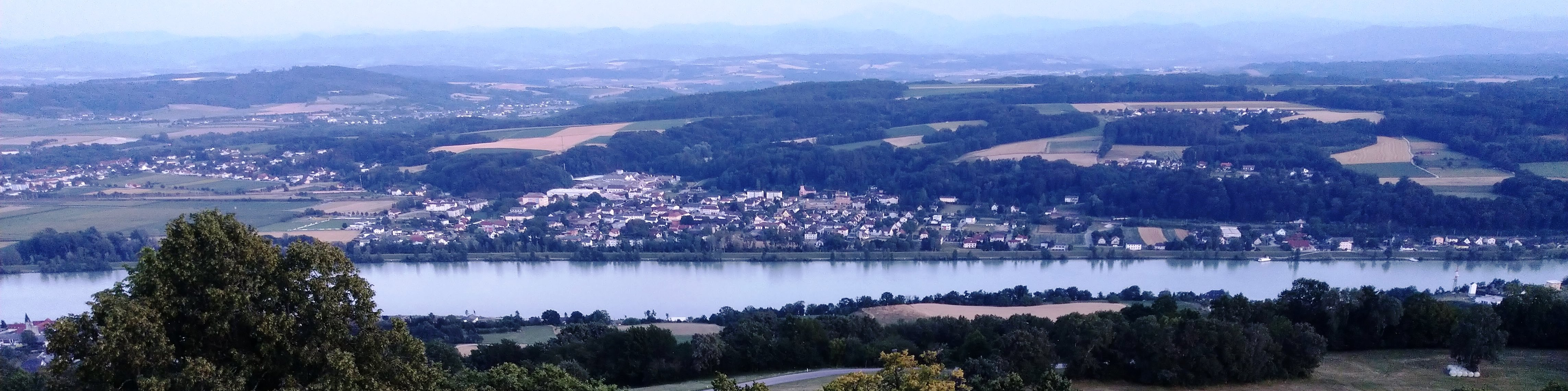 Gemeinde Krummnußbaum – Ortsteile Krummnußbaum (Mitte), Gollingerweg (links), Annastift (rechts Mitte) und Neustift (rechts oben). Im Vordergrund die Donau, im Hintergrund der Ötscher. Krummnußbaum